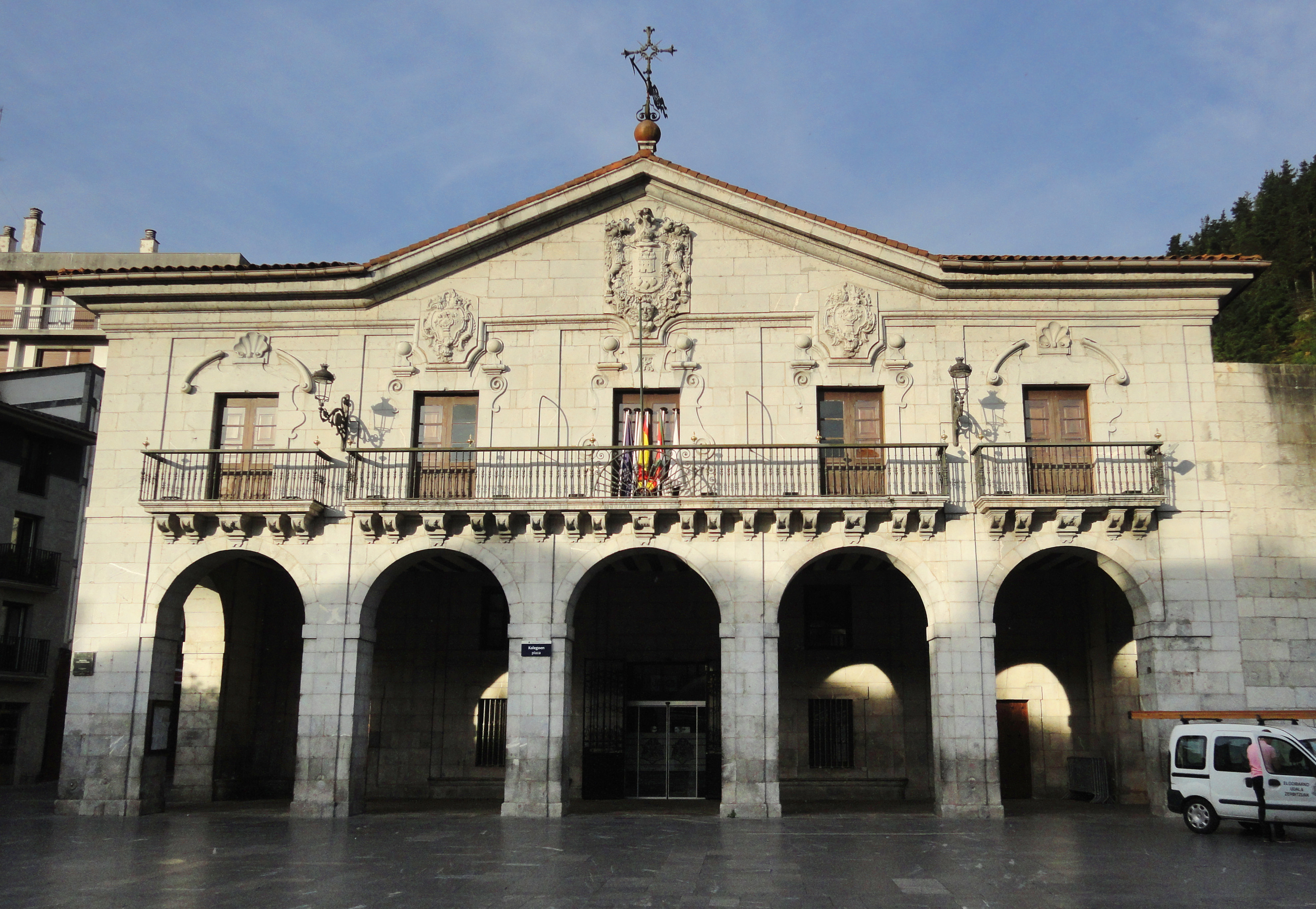 Elgoibarko udaletxea